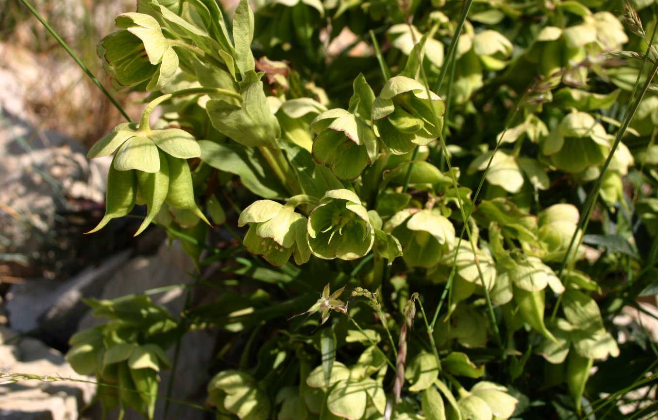 Helleborus foetidus on Mont Ventoux